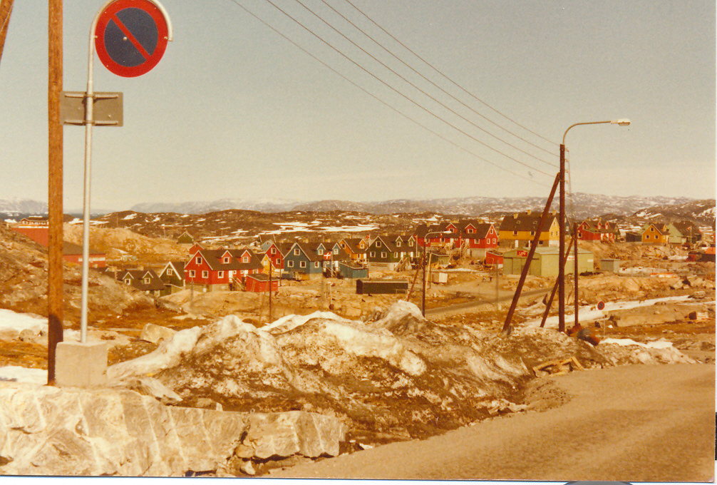 Ilulisat, 1980 Photo by Jan Kronsell